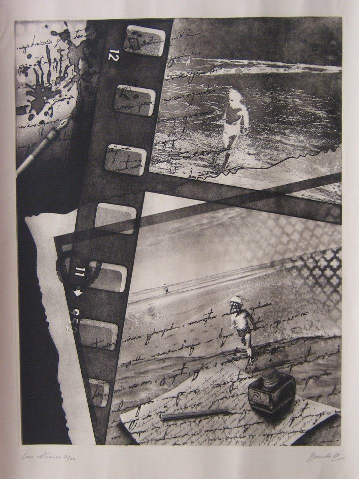 Fotograbado